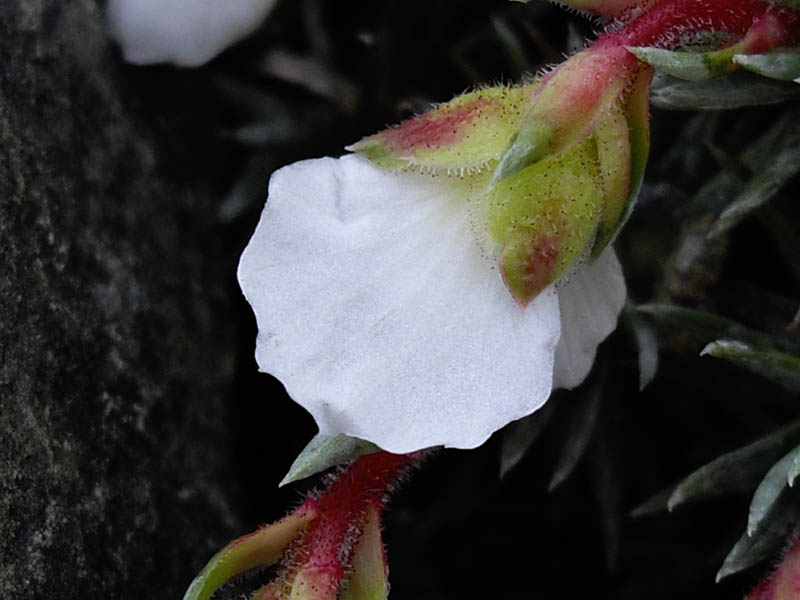 Saxifraga burseriana 'Crenata'